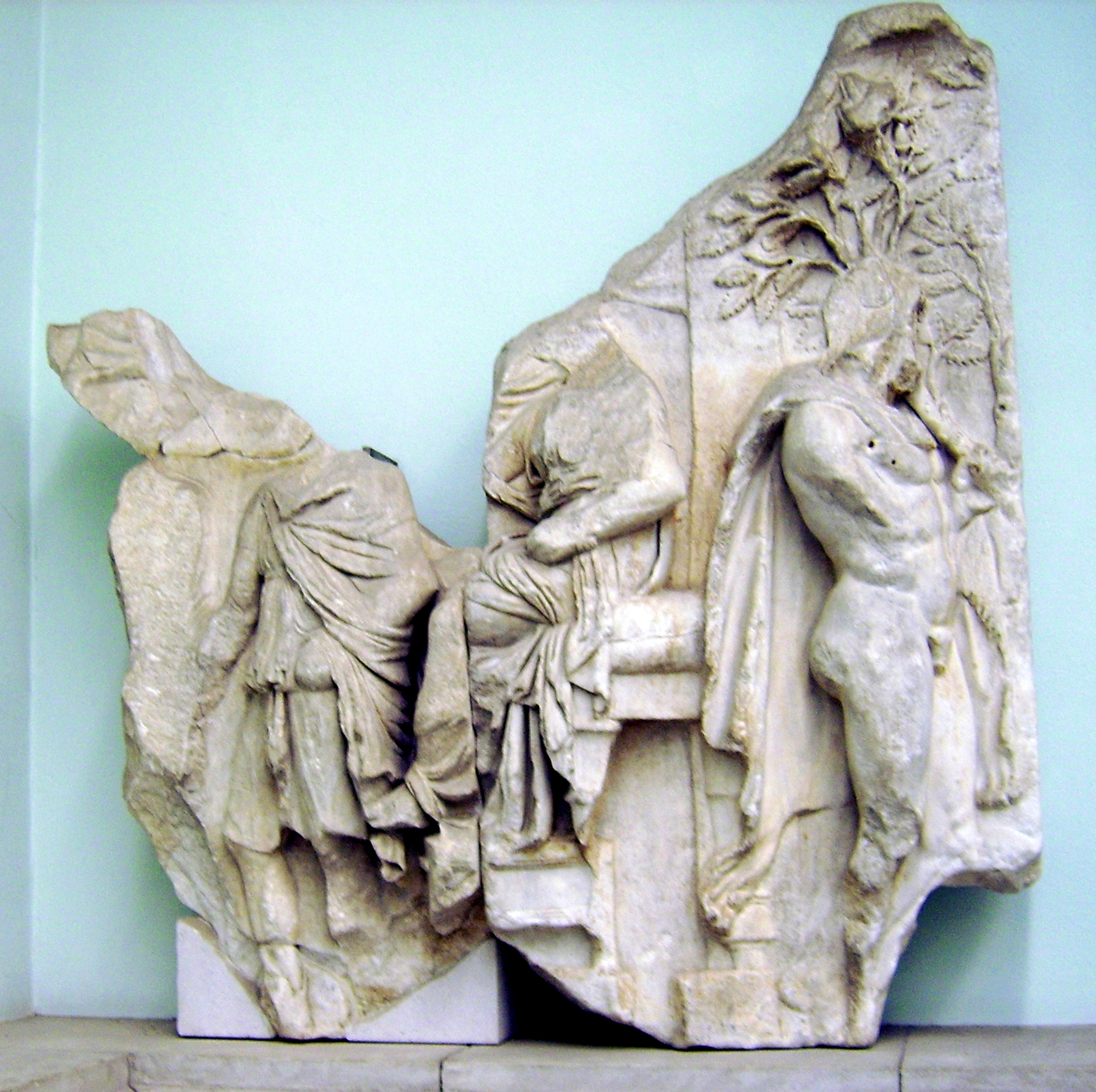 Platten 2 und 3 - 2: Am Hof von König Aleos; 3: Herakles erblickt dessen Tochter Auge im Tempel. Herakles am Hofe des Aleos, Telephosfries.